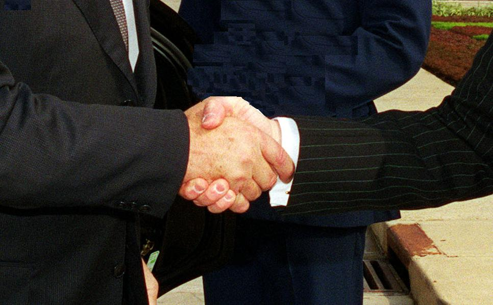 From Image:Adolf Ogi.jpg